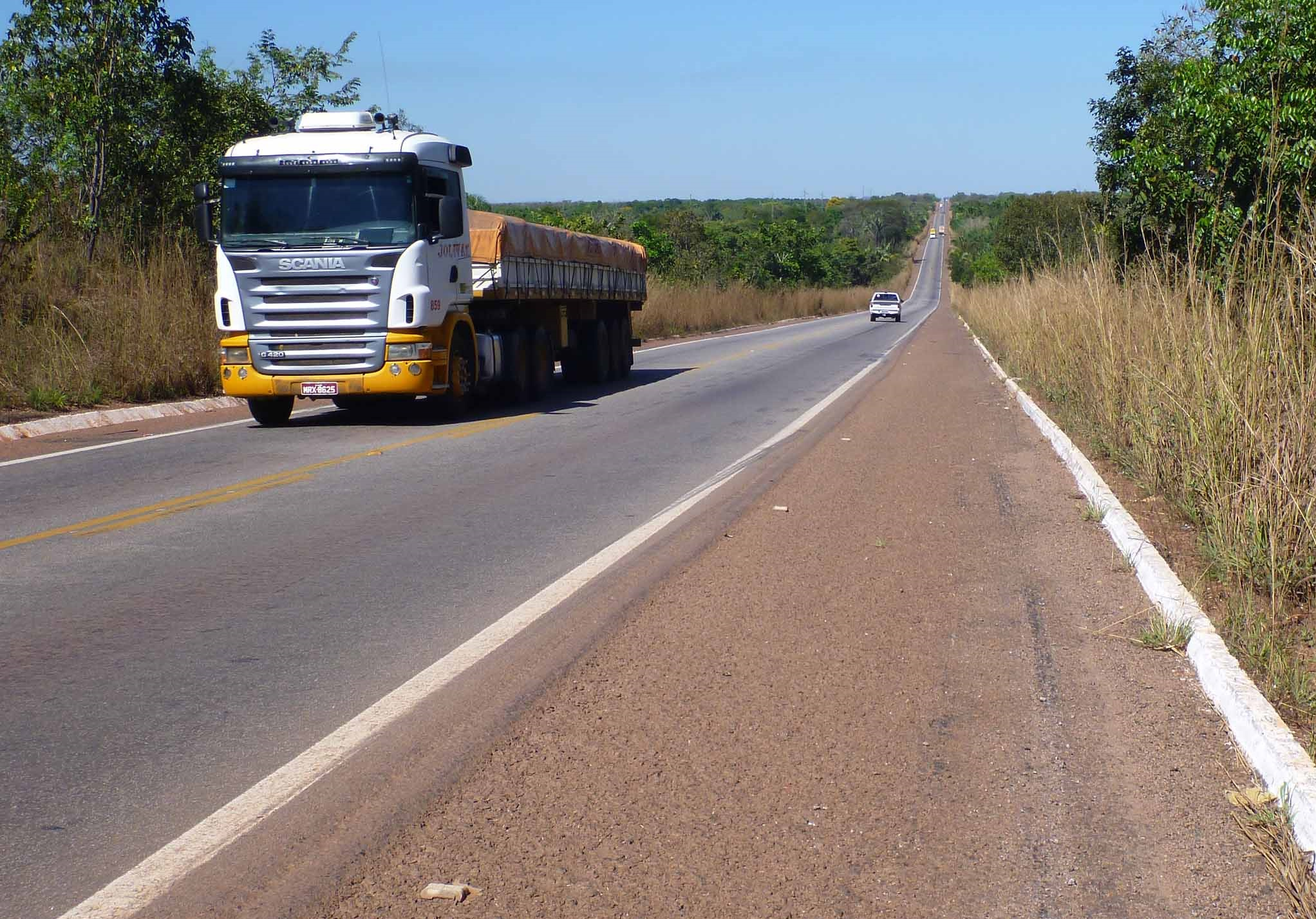 Pesquisa CNT de Rodovias 2012 - Foto: Arquivo/CNT